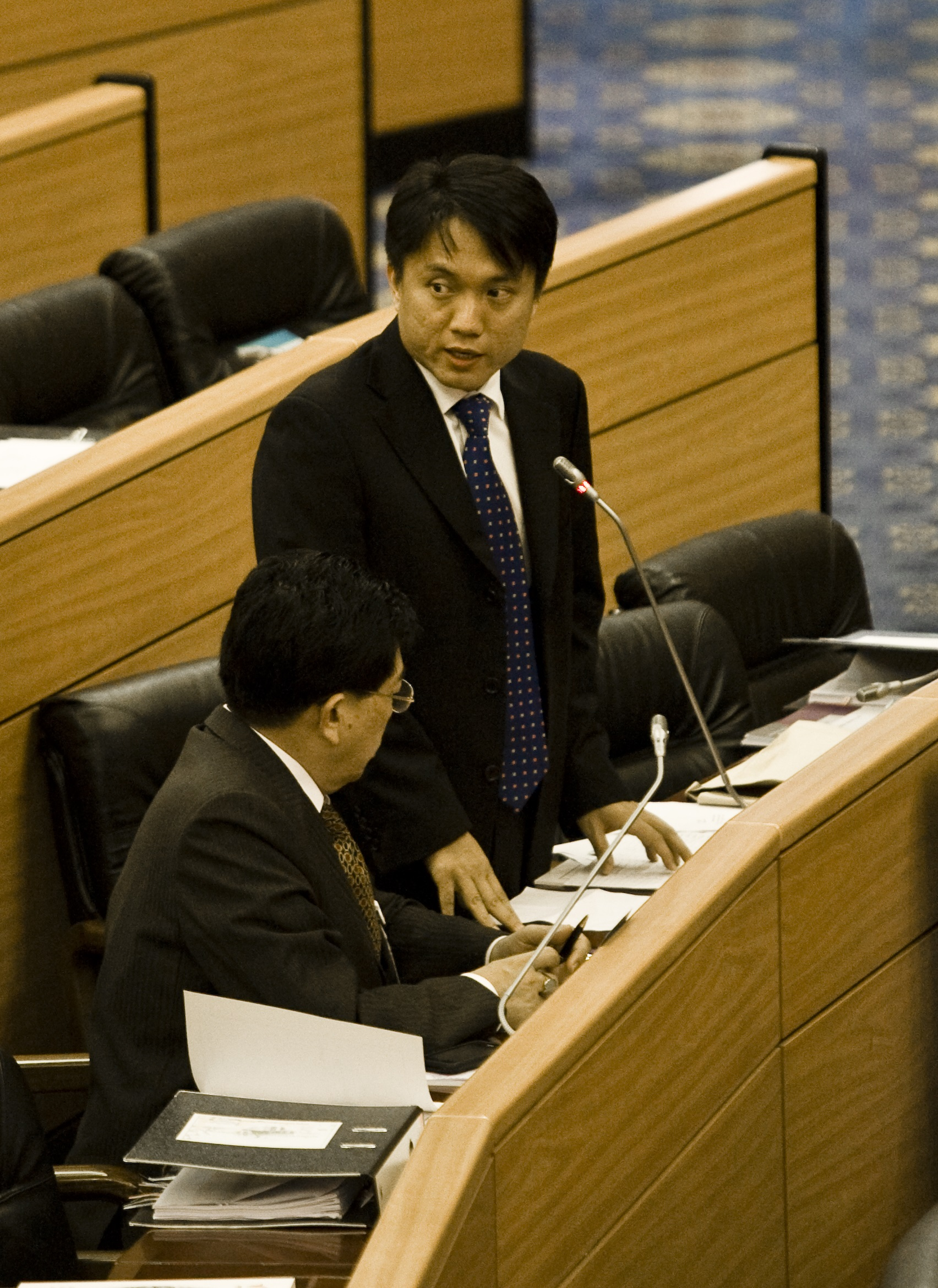 การประชุมสภาผู้แทนราษฎร ณ อาคารรัฐสภา ถนนอู่ทองใน 20สิงหาคม2552 (The Official Site of The Prime Minister of Thailand Photo by พีรพัฒน์ วิมลรังครัตน์)